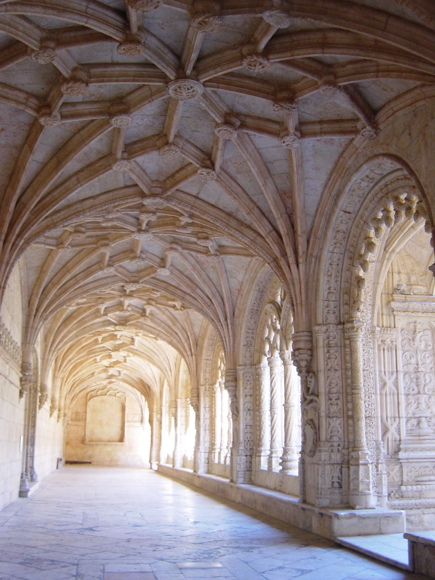 ジェロニモス修道院、ベルン、リスボン、ポルドガル